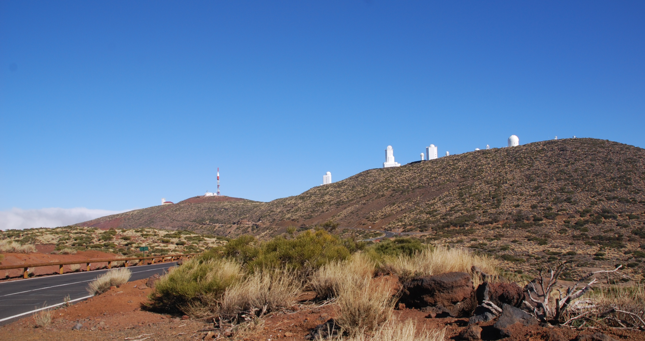 Teide Observatorium von Izaña, links das Meteorologische Institut